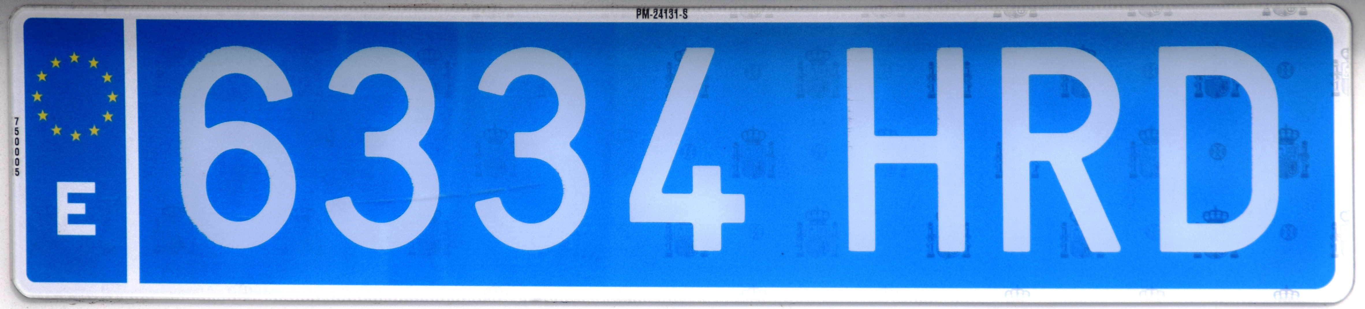 Taxi kentekenplaat achter Spanje